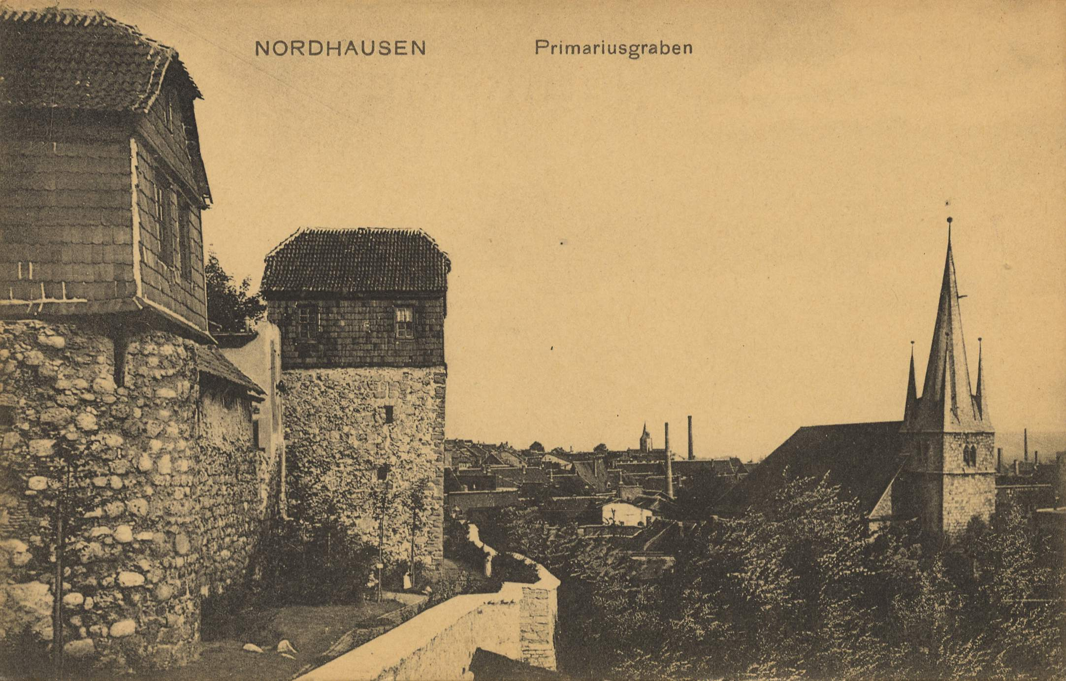 Nordhausen, der Primariusgraben war ein Abschnitt an der Südwestseite der mittelalterlichen Stadtbefestigung